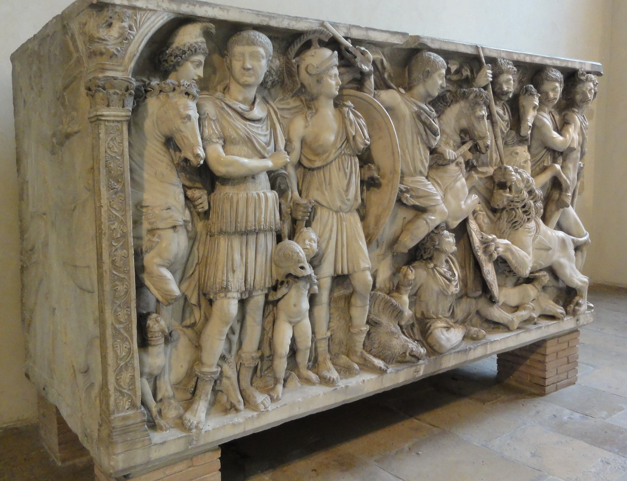 Tombeau de Jovin Musée Saint-Remi